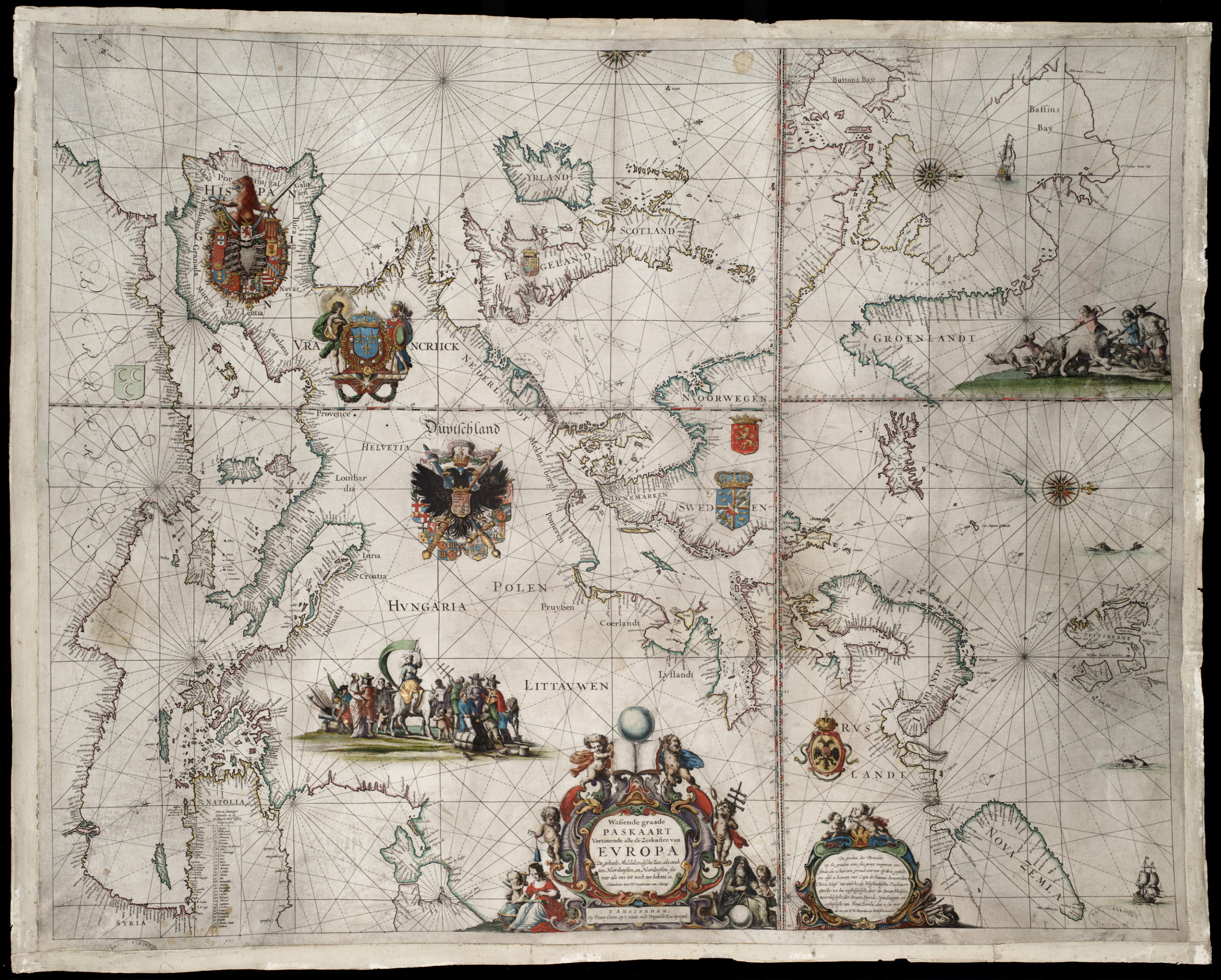 Wassende graade paskaart, vertonende alle de zeekusten van Europa, de geheele Middelandsche Zee &c.